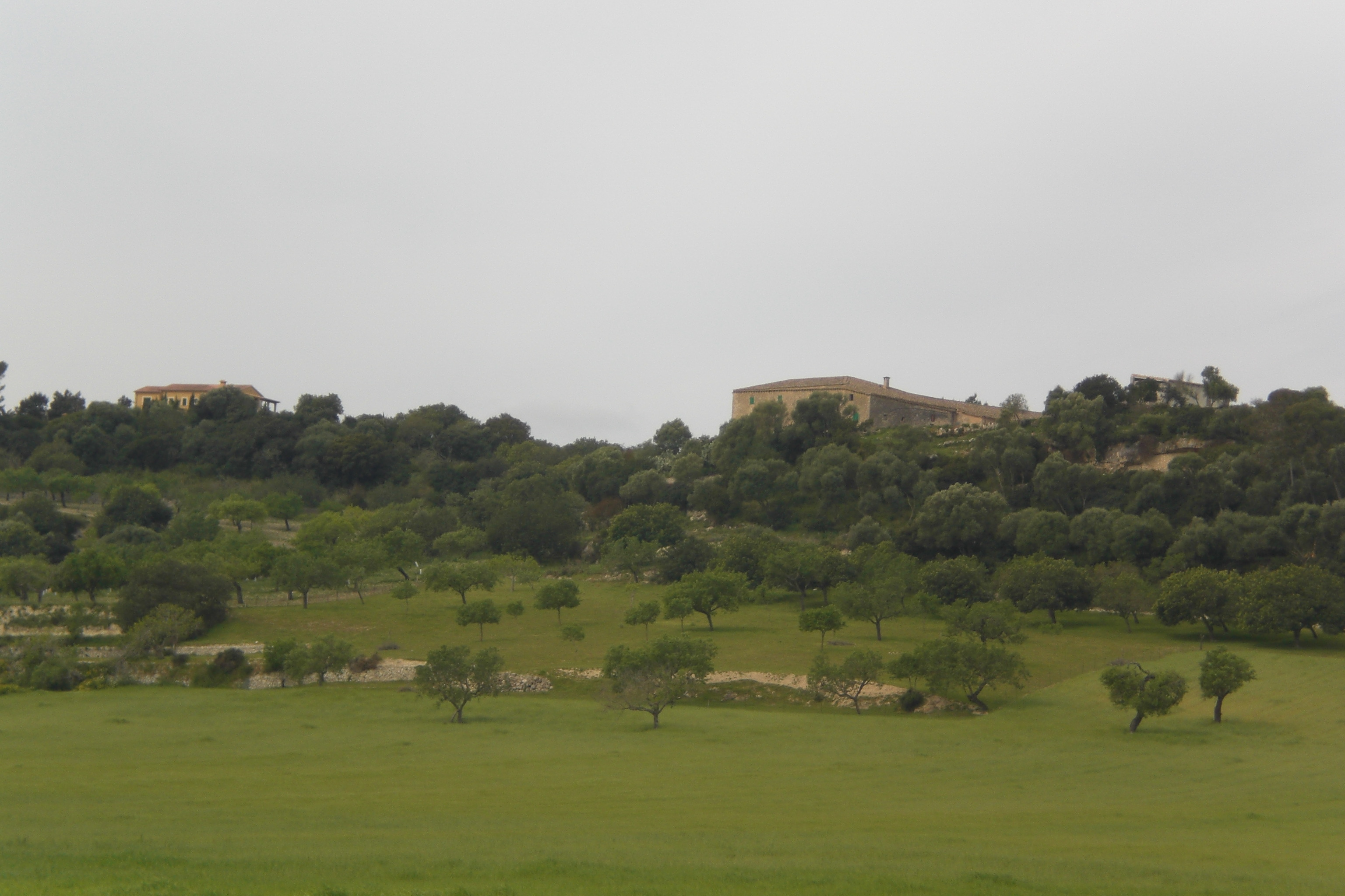 La possessió de son Toni Coll sobre la serra del Fonoll (Montuïri, Mallorca)